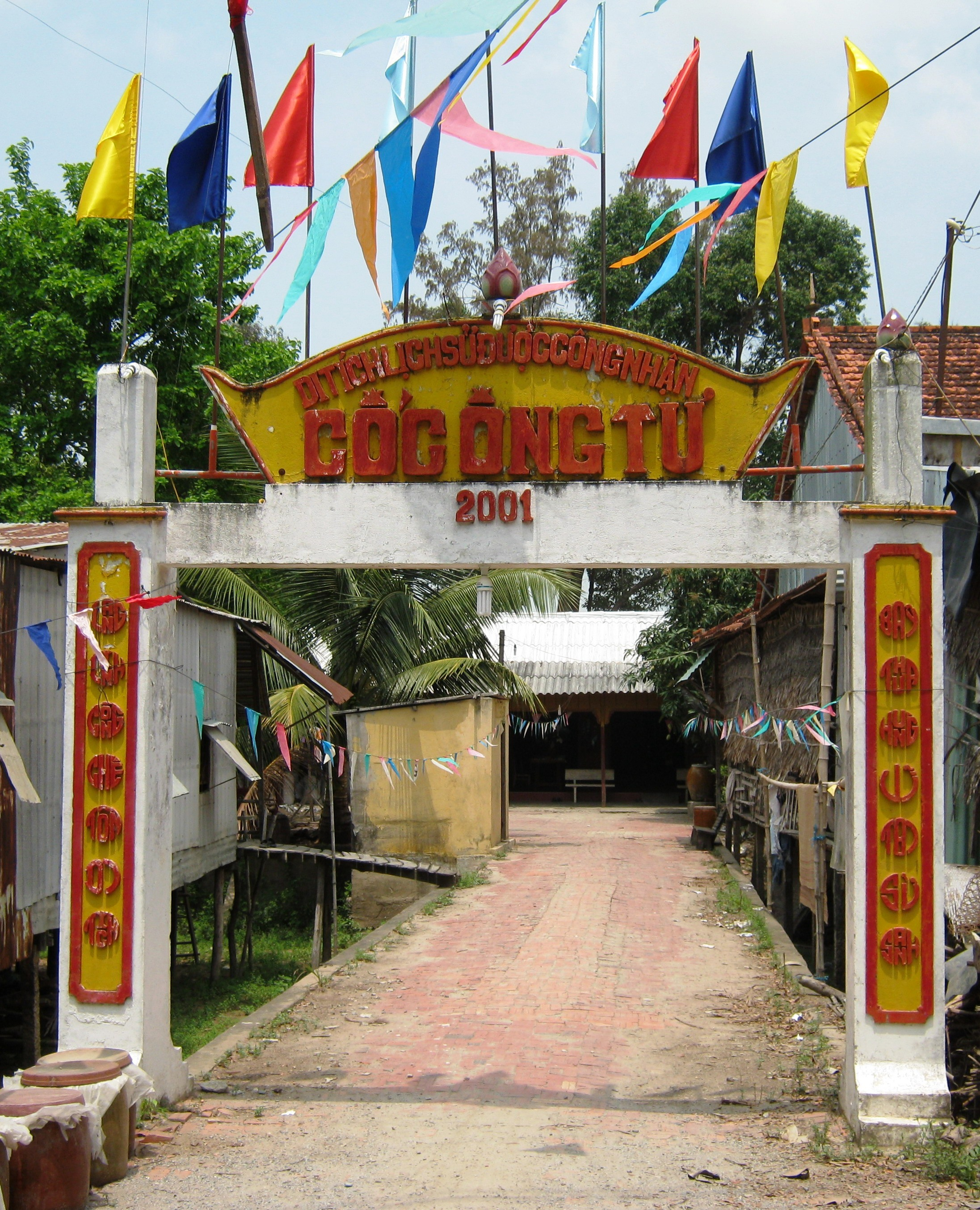 Cốc Ông Tư (còn gọi là Cốc Ông Đạo Cậy. Trong ảnh là căn nhà gỗ lợp tôl ở cuối lối đi) nay thuộc Châu Phú, An Giang, Việt Nam. Rất có thể ở vị trí này, khi xưa là chỗ của Hưng Trung doanh, căn cứ chính của Khởi nghĩa Bảy Thưa (1867-1873).